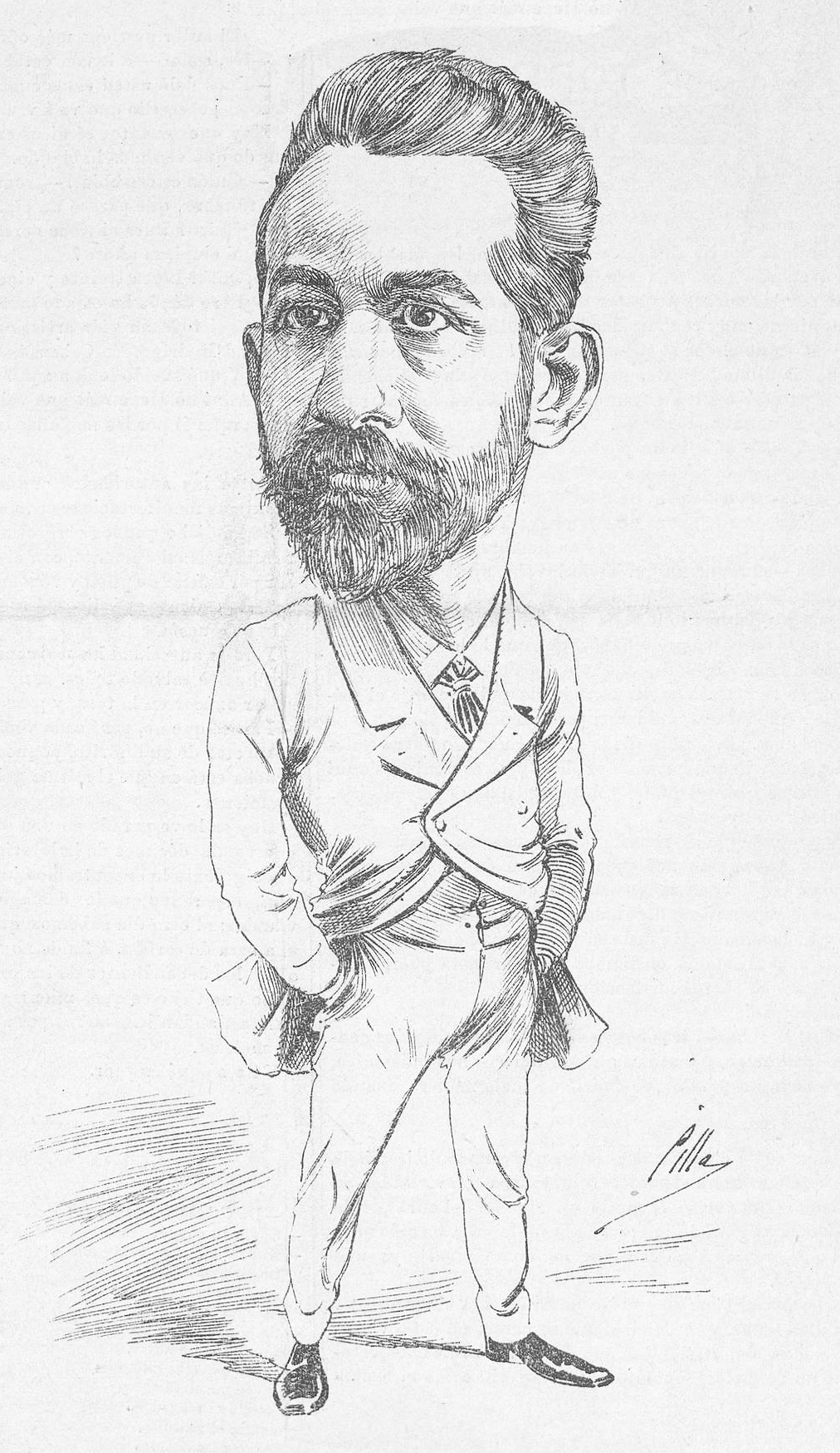 Emilio Serrano.